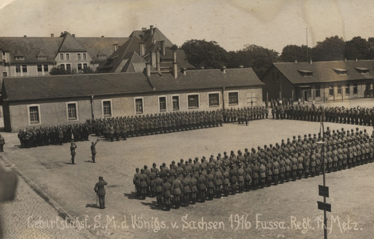 Fußartilleriekaserne in Metz